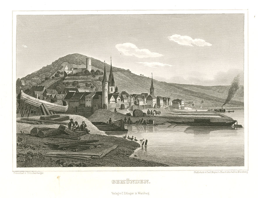 Gemünden. Stahlstich nach Vorzeichnung von Fritz Bamberger, 1847, aus: Ludwig Braunfels; Die Mainufer und ihre nächsten Umgebungen. Verlag Carl Etlinger, Würzburg 1847. Gedruckt in der Kunstanstalt von Carl Mayer, Nürnberg.